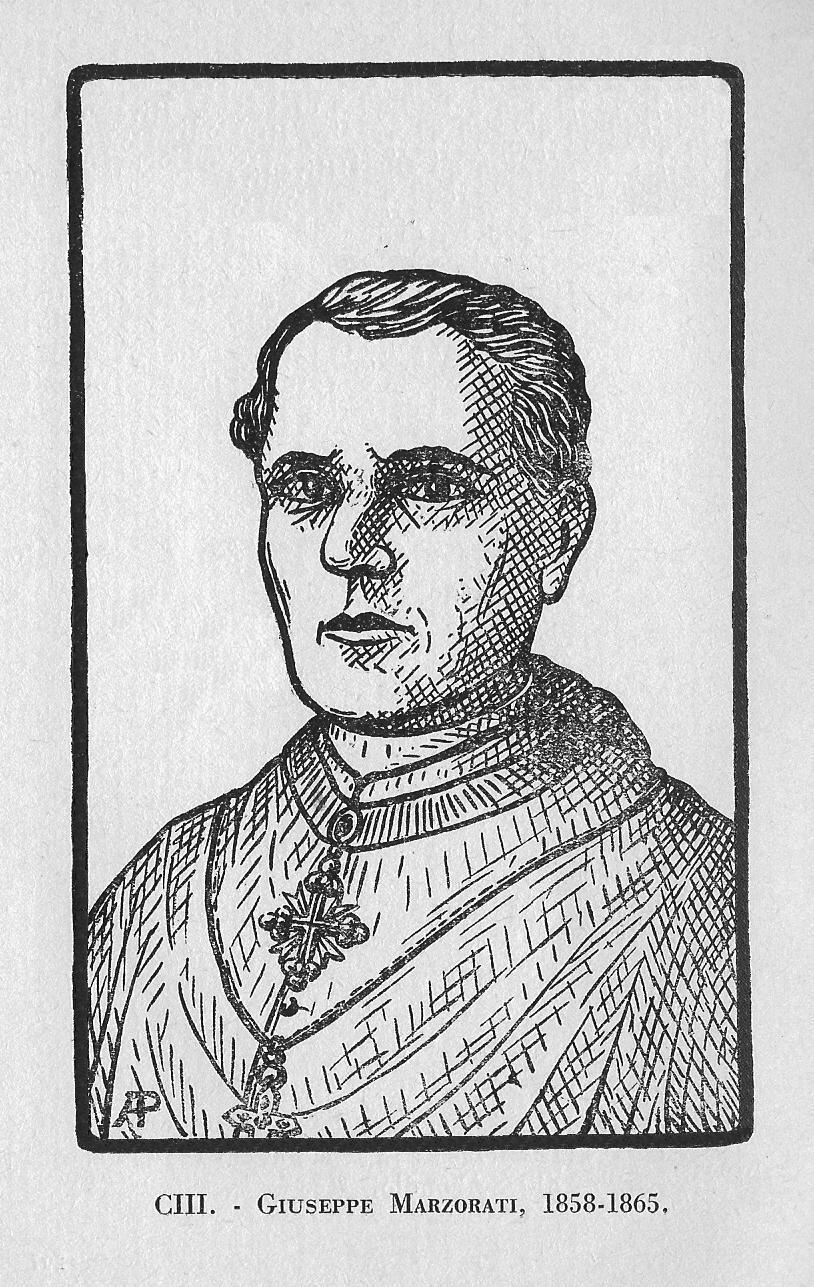 ritratto di Giuseppe Marzorati, vescovo di Como, 1858-1865